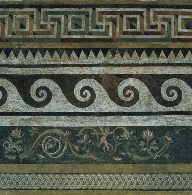 Meander-motieven van het Attalos II-paleis te Pergamon (159-138 BC) Pergamon-museum Berlijn.